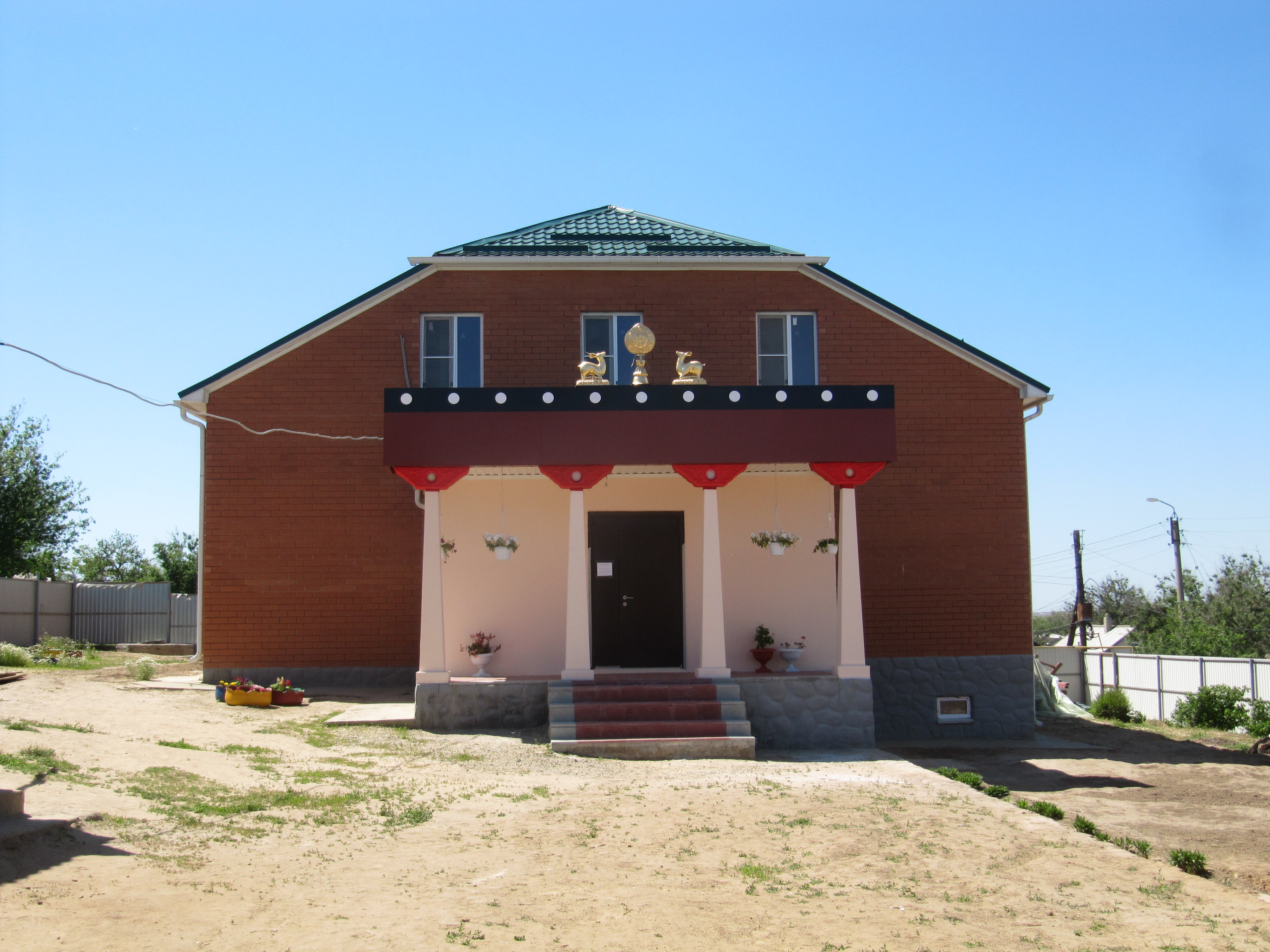 Хурул в Троицком, Калмыкия